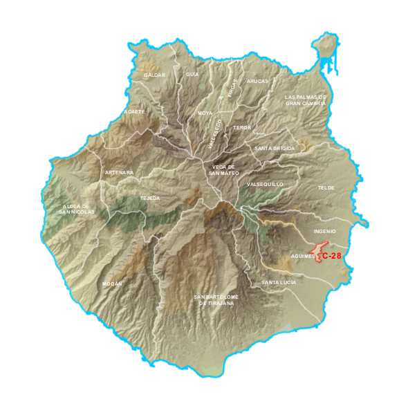 Usado conforme a lo estipulado por el Cabildo de Gran Canaria, prohibiendo su uso con fines lucrativos, obligatoriedad a citar a su autoría y usado con buena finalidad. ¨Se prohíbe la reproducción total o parcial de los contenidos del portal sin citar su origen o solicitar autorización. El usuario accederá al Portal y hará uso del contenido del mismo conforme a la legalidad vigente en cada momento y a las normas de la buena fe, la moral y las buenas costumbres.¨